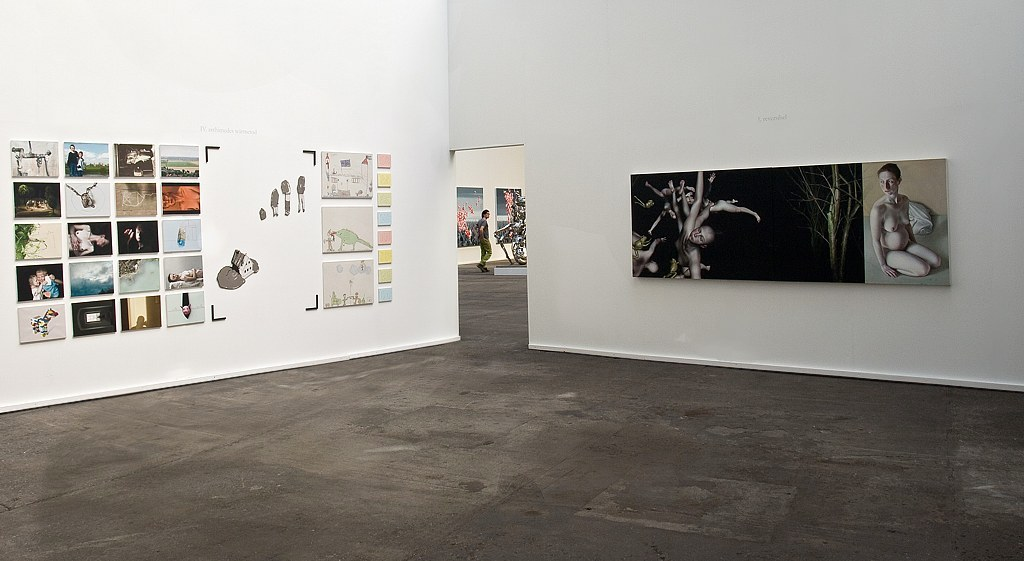 amok IV und amok I - Hängung bei der Nord Art 2008